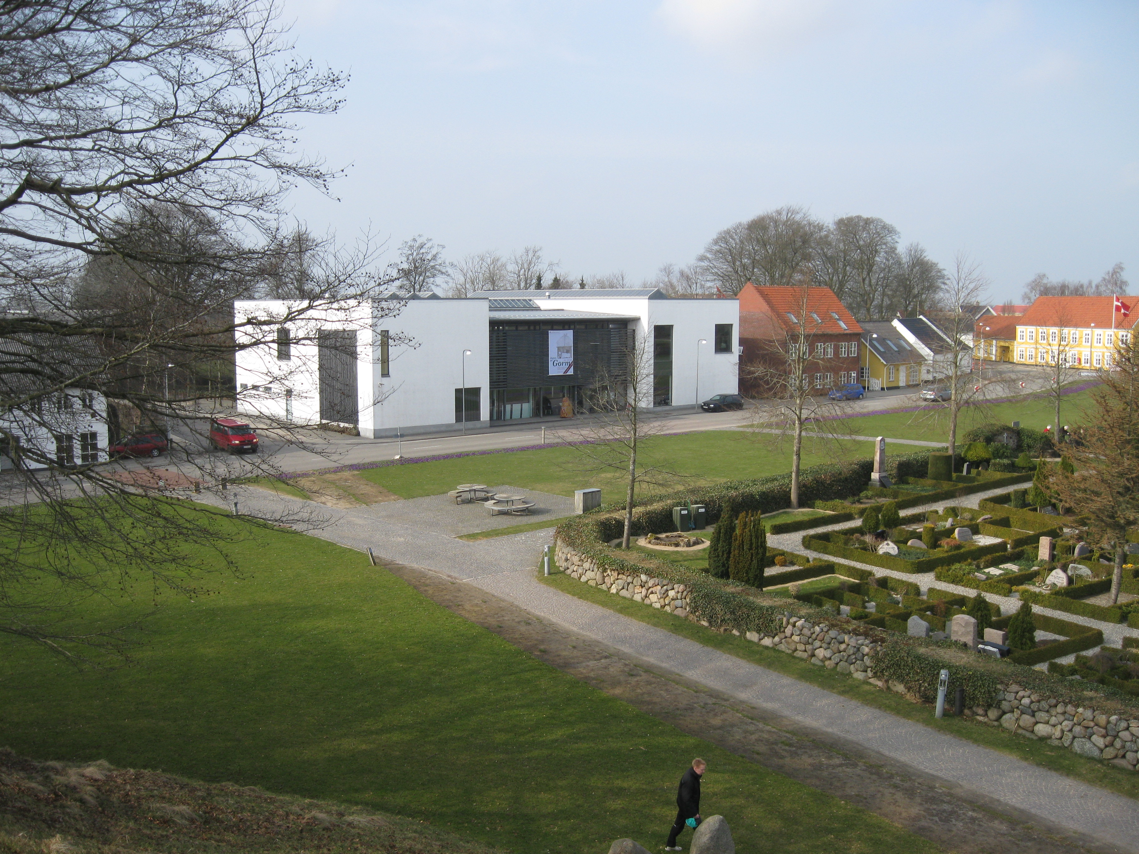 Kongernes Jelling